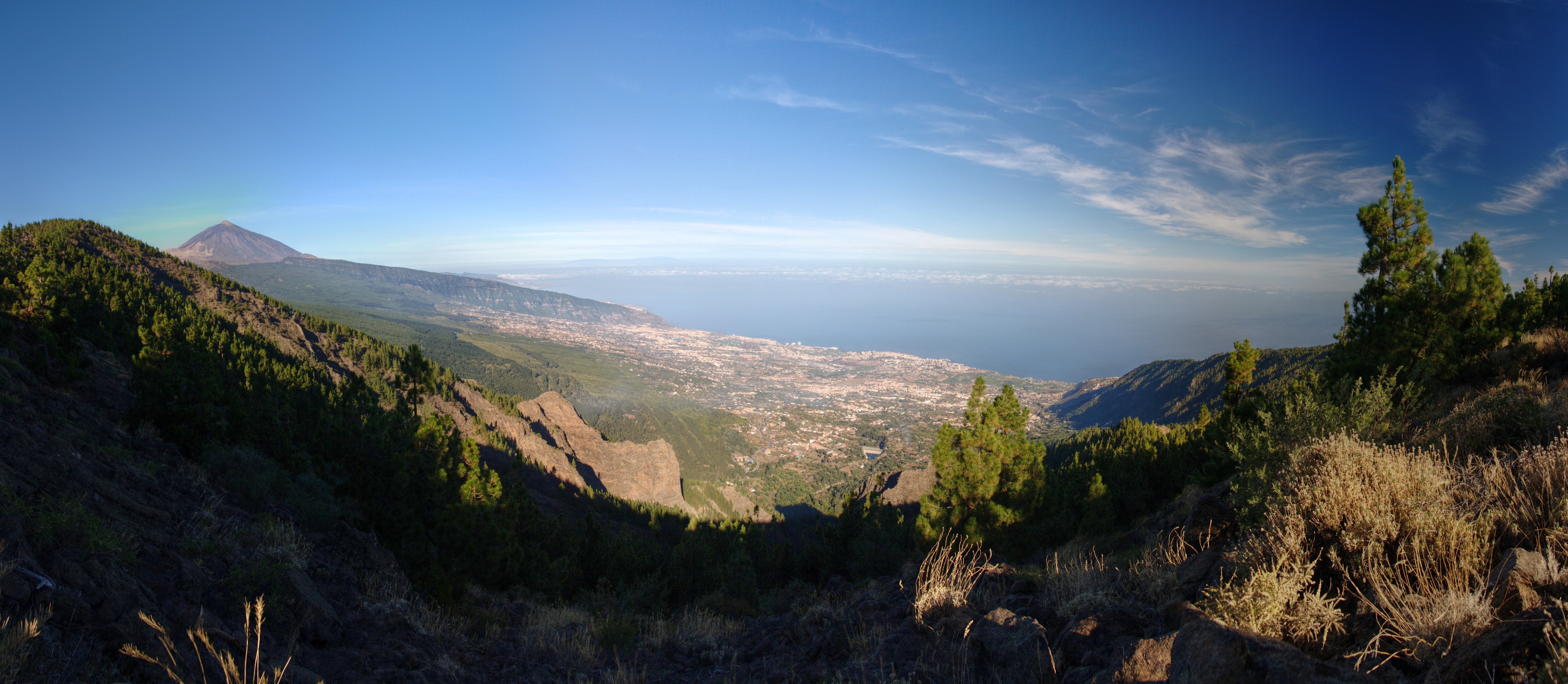 Desde la dorsal a la altura del Barranco Jilargo. Un valle de deslizamiento, entre las laderas de Pinolere y Tigaiga, posterior al de Güimar y previo al de Pedro Gil.